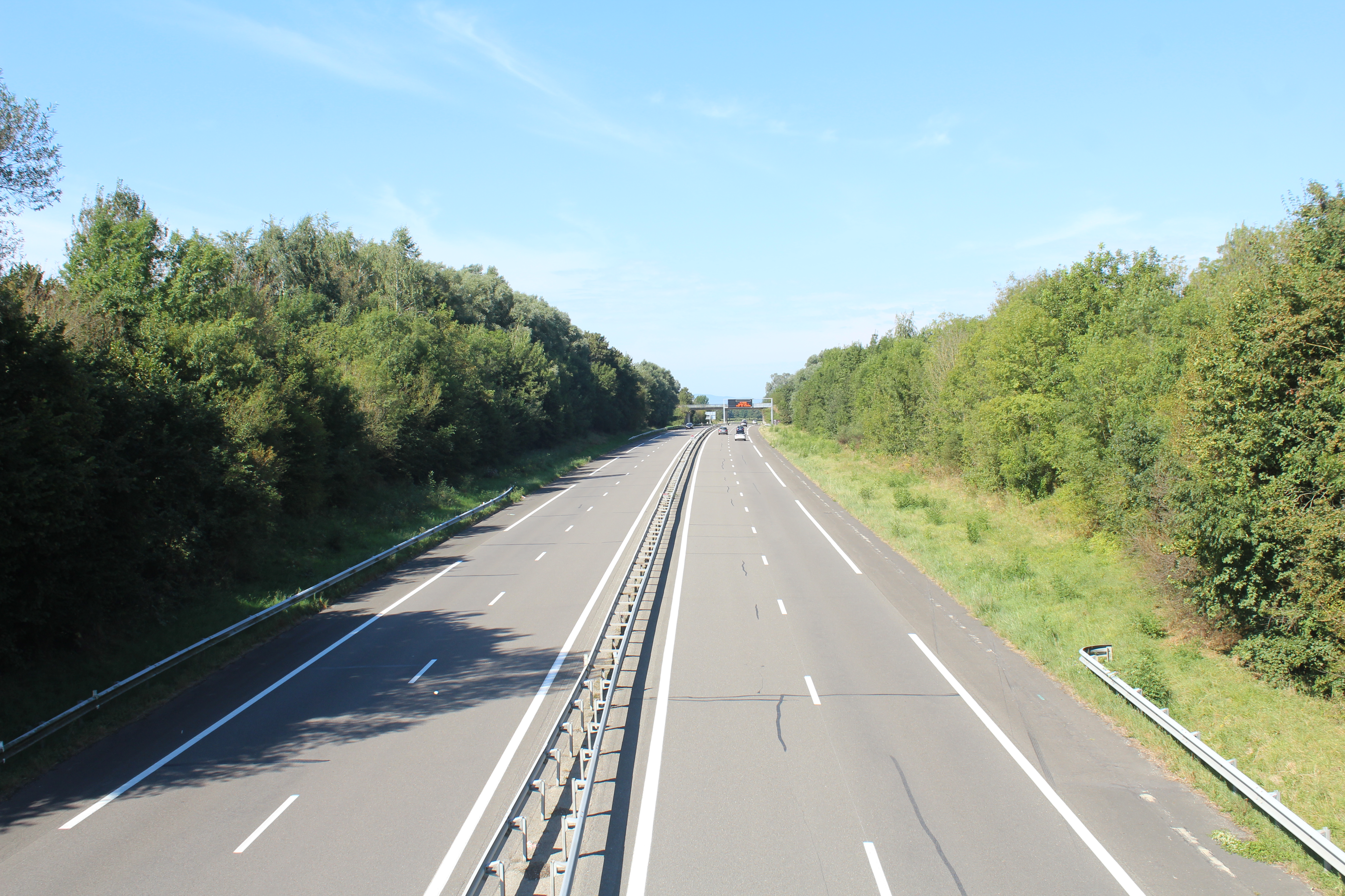 L'autoroute A40 à Confrançon.